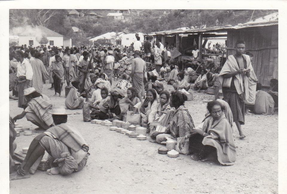 O convívio no bazar,onde se trocavam produtos e se mascava.A masca era uma mistura de folha de bétel,noz de areca e cal que produzia uma pasta avermelhada.Na boca ficava entalada no lábio.